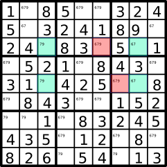 Udelukkelse via rektangel